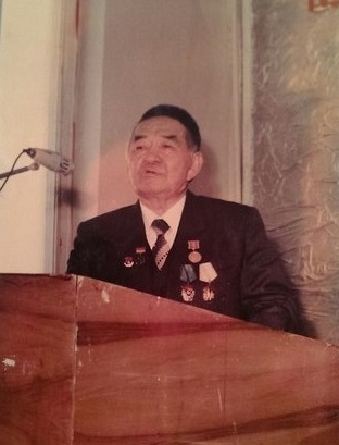 Қазақша (кирил): Байназаров Ш.